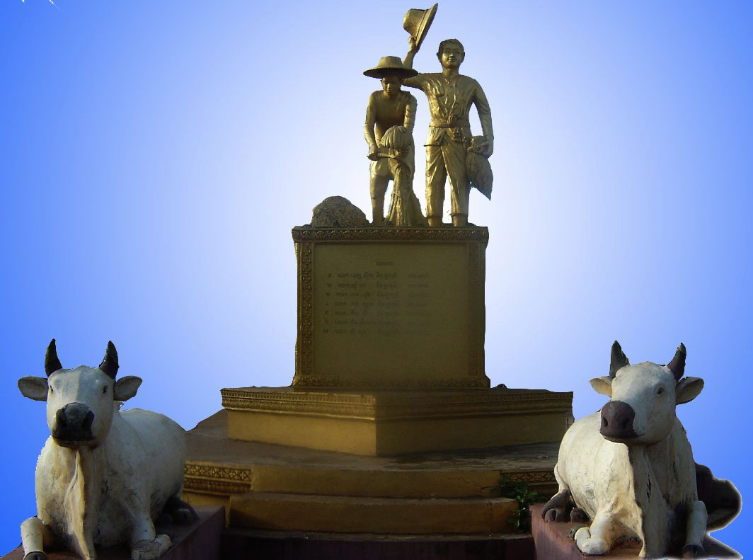 ភាសាខ្មែរ: យាយជីច្រូតស្រូវ-និមិត្តរូបស្រុកមង្គលបូរី